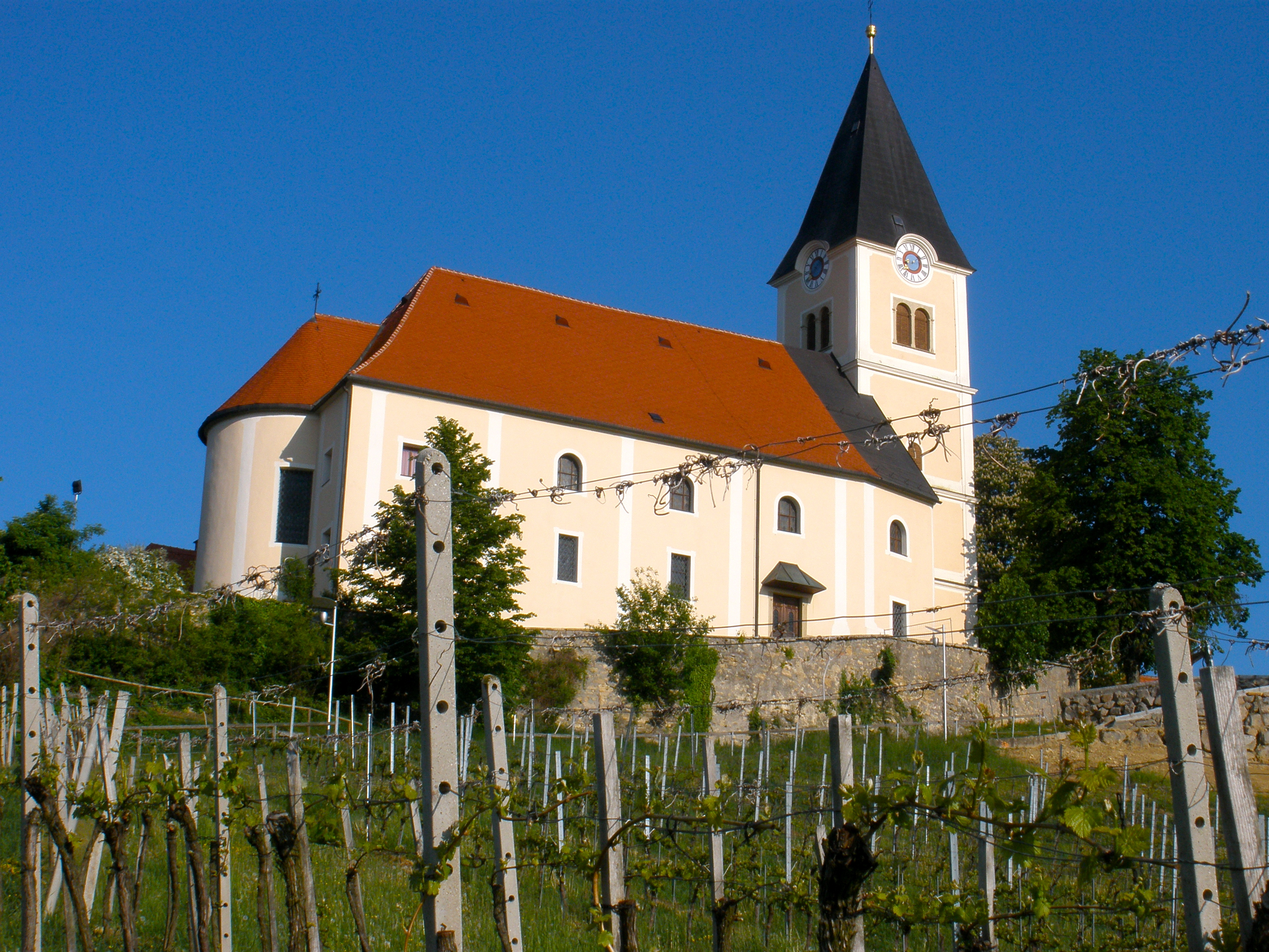 Die Pfarrkirche in St. Anna am Aigen wurde 1712 fertiggestellt und 2005 einer gründlichen Renovierung unterzogen. Eine künstlerisch besonders wertvolle Skulptur über dem Hochaltar stellt dar, wie die Heilige Mutter Anna ihrer Tochter Maria das Lesen lernt; das älteste Kunstwerk der barocken Kirche ist ein Gemälde, auf dem die Heilige Dreifaltigkeit abgebildet ist.